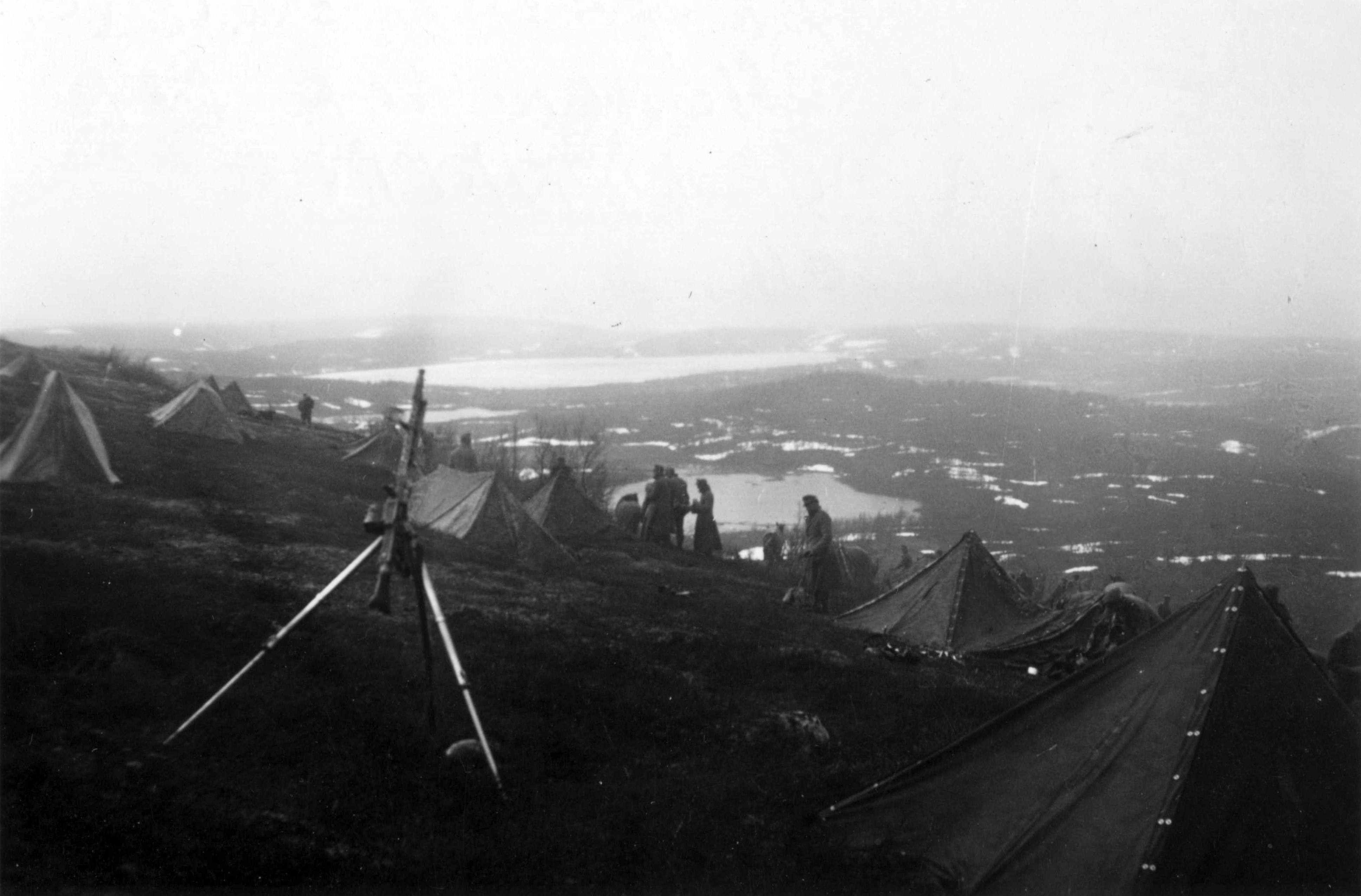 Klargjøringsområdet på finsk side i Titowka Tittel / Title: Klargjøringsområdet på finsk side i Titowka Dato / Date: 28.061941 Fotograf / Photographer: Ukjent/Unknown Utgiver / Publisher: Sted / Place: Finland Eier / Owner Institution: Arkiv i Nordland Lenke / Link: Arkiv i Nordland Arkivreferanse /Archive reference: AIN.NA143.0266 Fra Dag Skogheims Privatarkiv Tekst bak bildet: 28.06.1941: Bereitstellung hinter den Höhen vor der Titowka, auf finnischer seite noch. 28.06.1941: Beredskapsområdet bak en høyde ved Titowka, på finsk side.